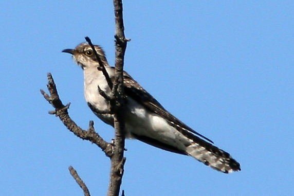 Pallid Cuckoo, Cuculus pallidus, immature